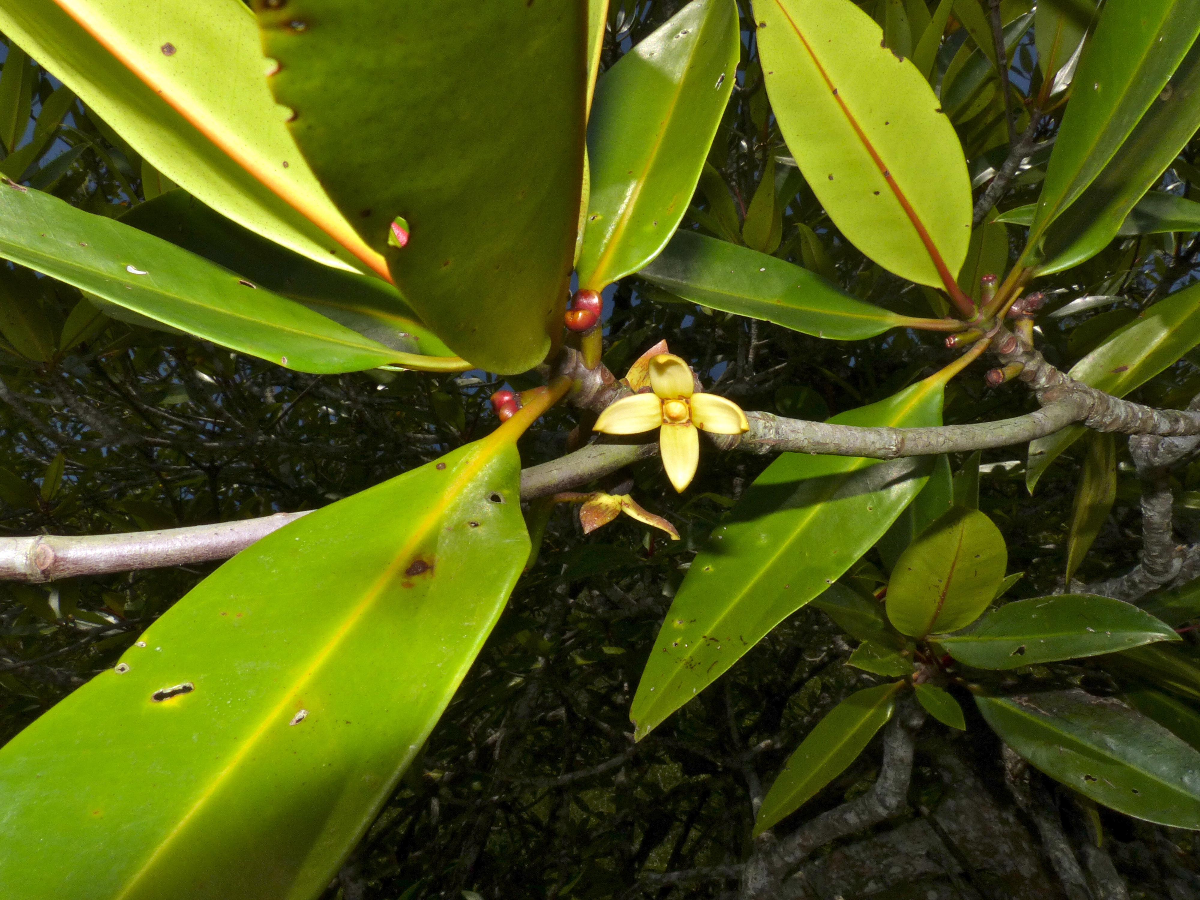 Bako NP, Sarawak, MALAYSIA